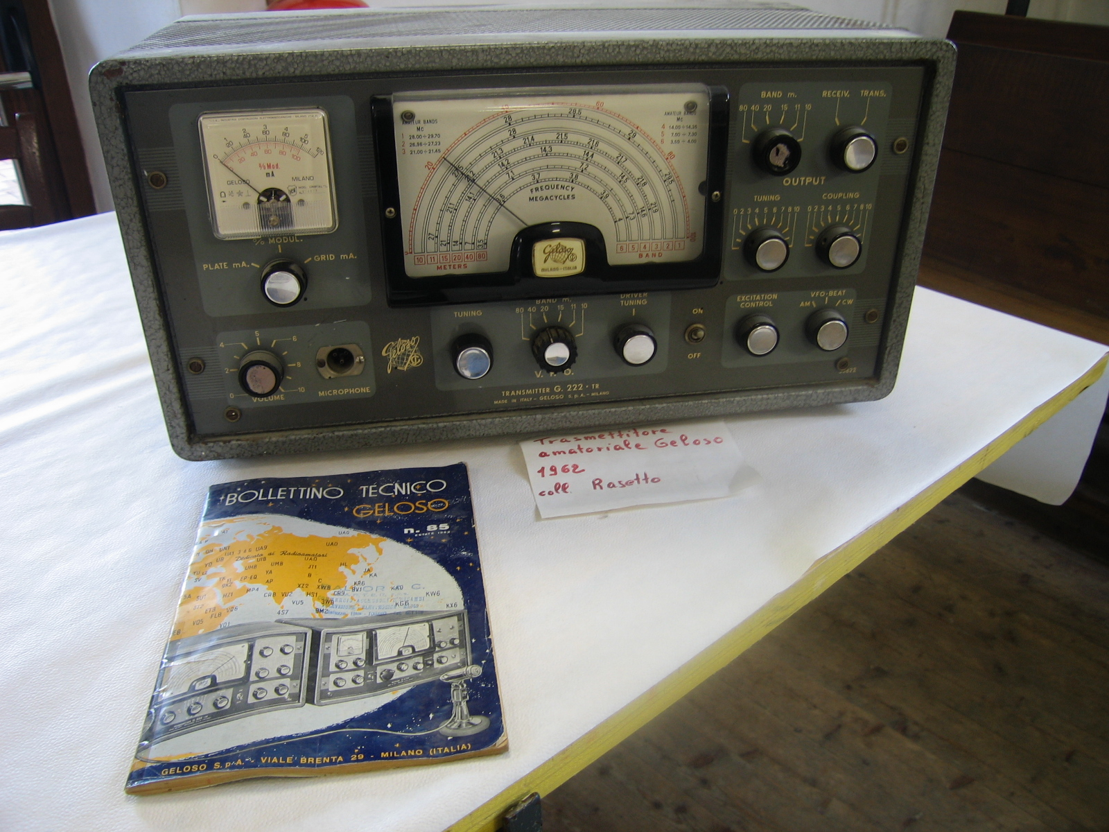 model: Geloso year: 1962